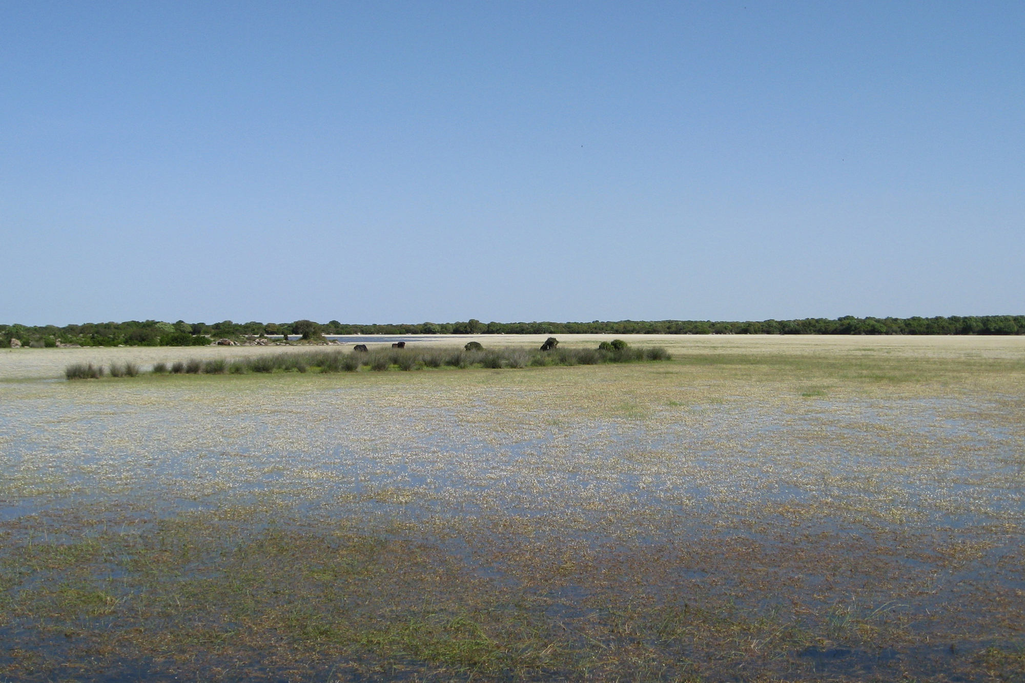 Lo Stagno di "Pauli Majori" nella Giara di Gesturi, Palmas Arborea, Sardegna